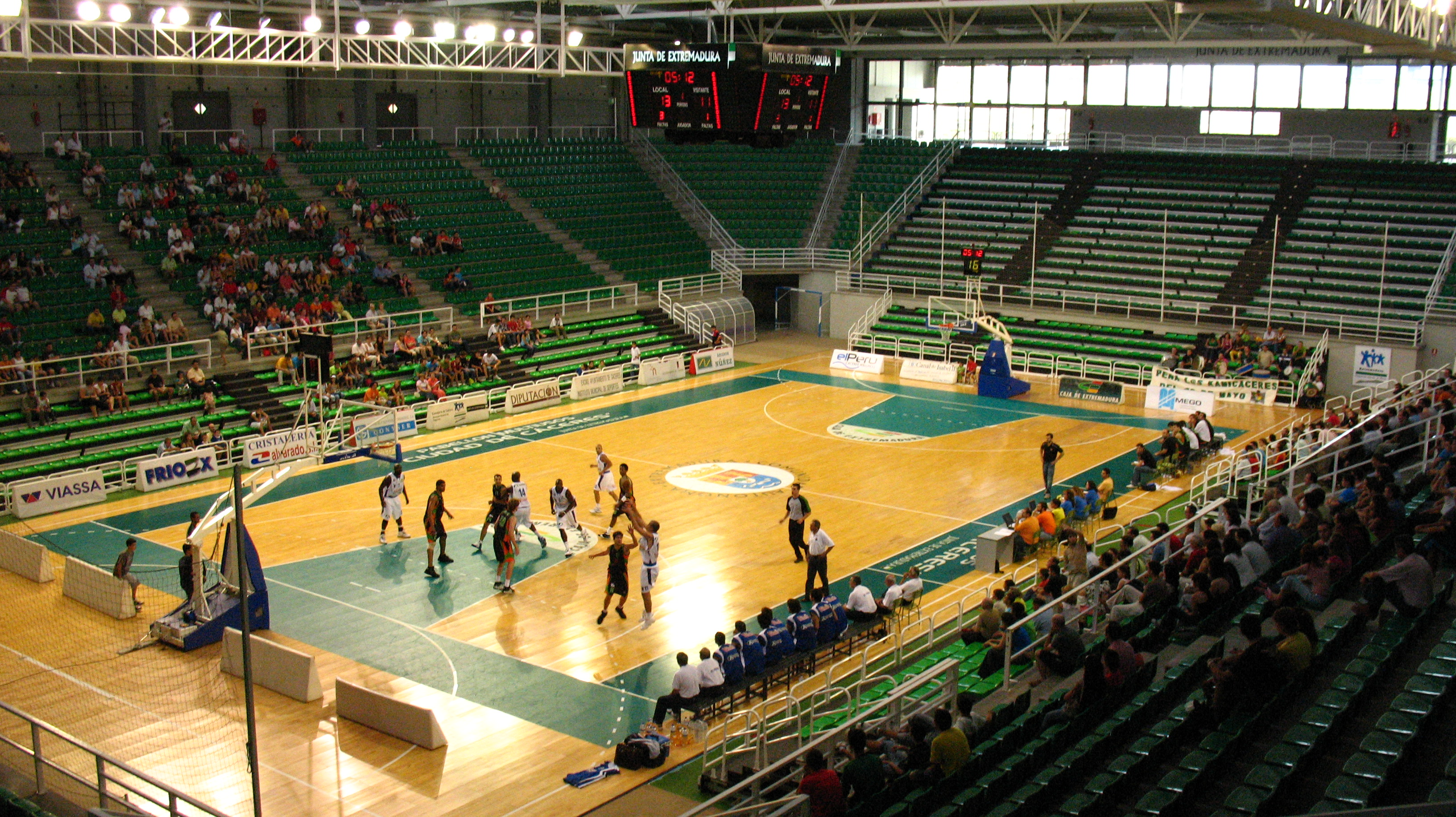 Pabellón Multiusos ciudad de Cáceres durante la disputa del trofeo Cáceres Patrimonio de la Humanidad 2007.